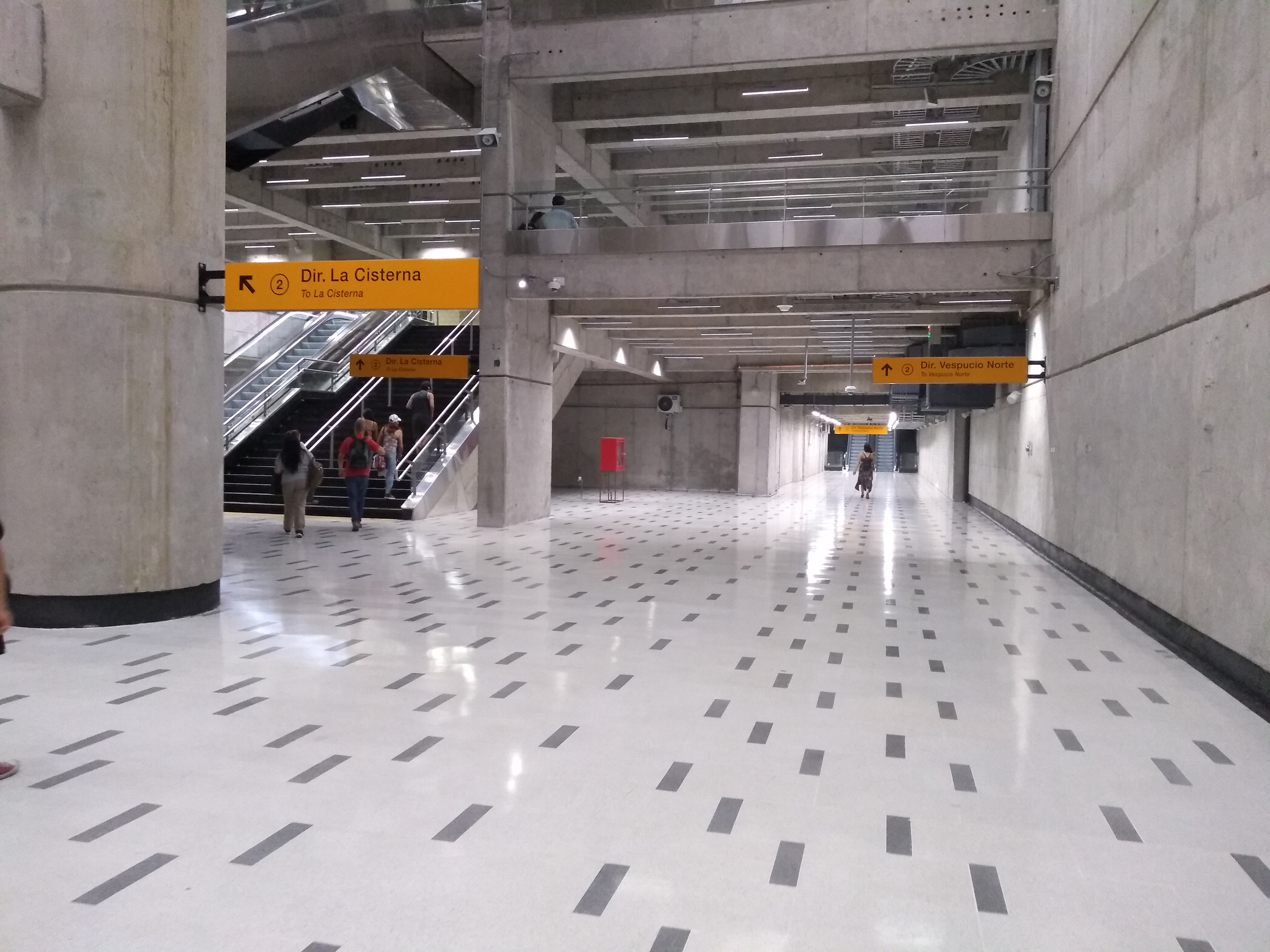 Cal y Canto, Nivel de combinación entre L2 y L3